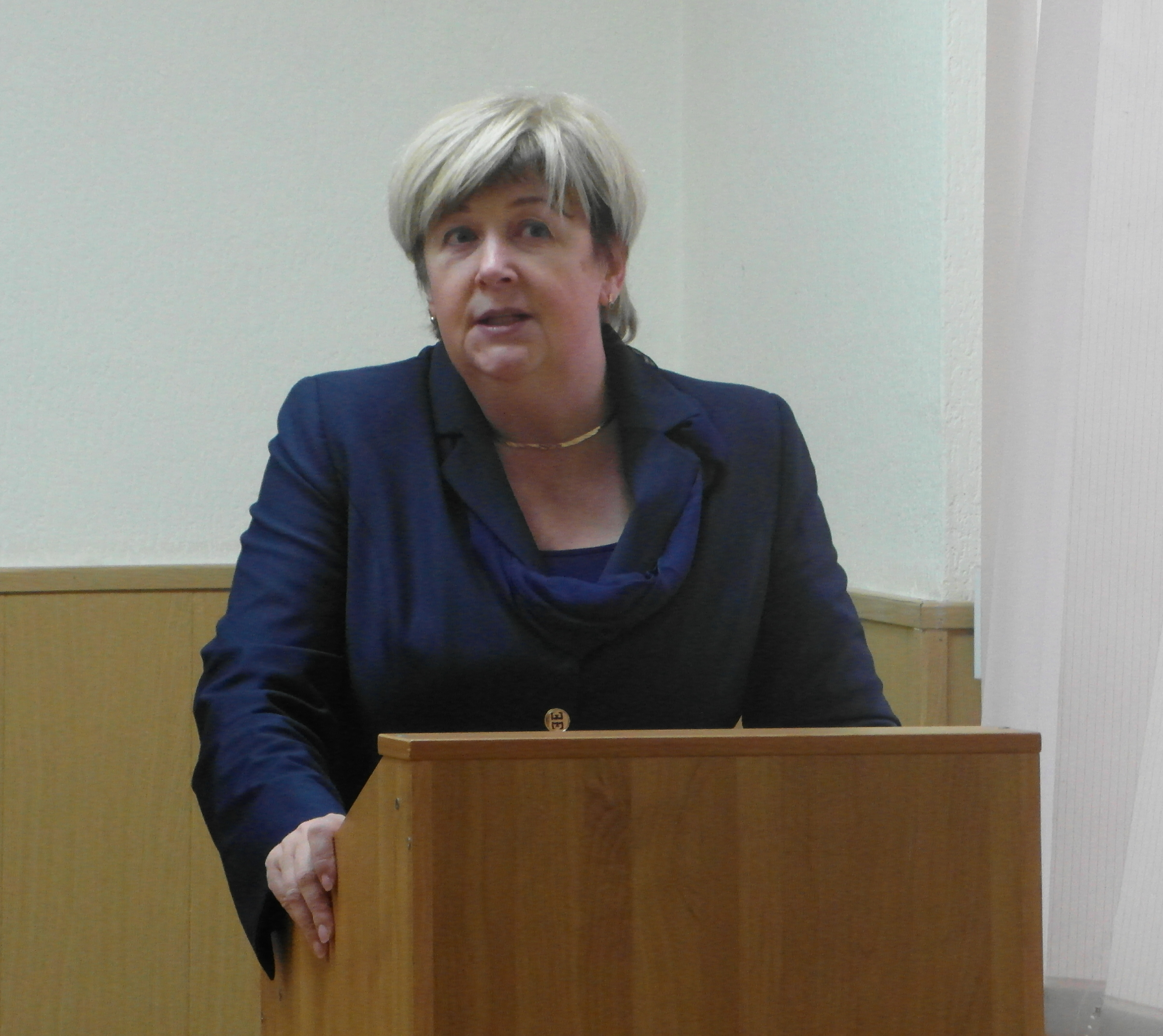 Ректор ЮФУ М.А. Боровская